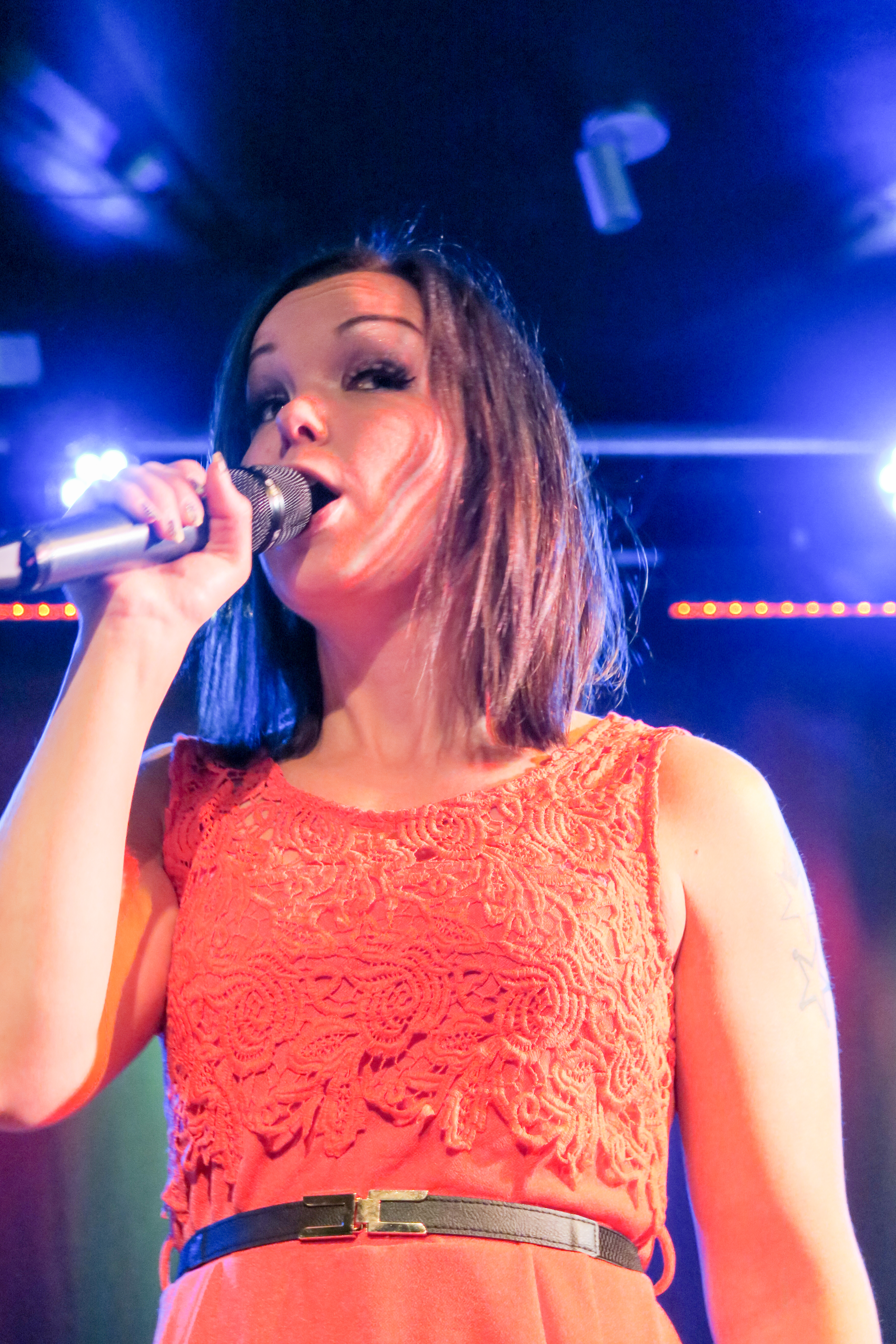 Maria Tyyster suomalainen laulaja